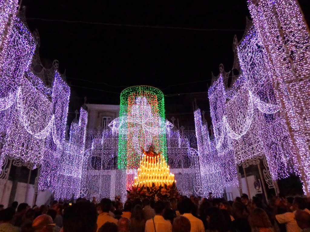 Assunzione agosto Novara di Sicilia